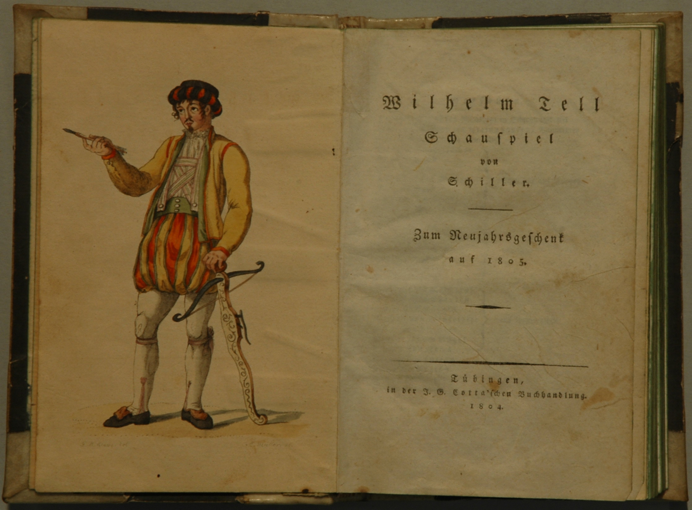 Friedrich Schiller: Wilhelm Tell / Schauspiel von Schiller. / Zum Neujahrsgeschenk auf 1805. Tübingen: J. G. Cotta 1804, 1kolorierter Kupferstich als Frontispiz + 1 Blatt Titel + 1 Blatt Personenzettel + 1 kolorierter Kupferstich + 241 Seiten mit einem nicht paginierten 3. Kupferstich zwischen Seite 132/133 + 1 Blatt Verlagsanzeigen; frühester Druck mit der Fehlpaginierung "711" auf Seite 171, Wilpert/Gühring² 43; die meisterlich kolorierten Kupferstiche stammen von Georg Melchior Kraus (1737 - 1806). Halbpergament der Zeit und Pergamentecken.